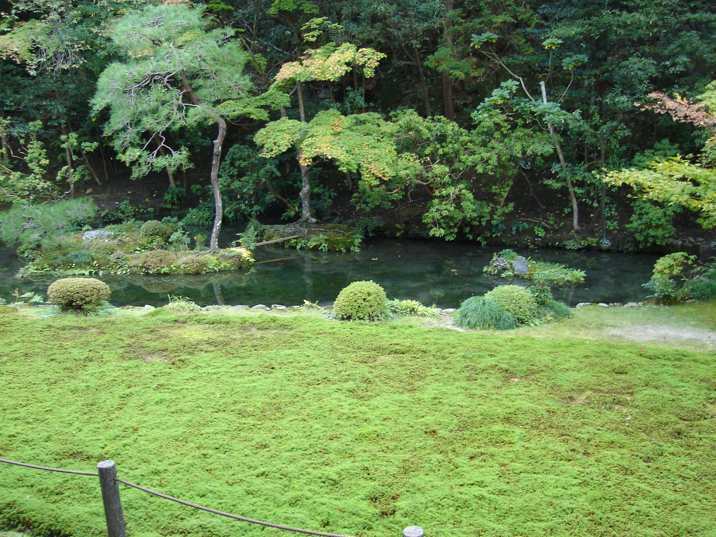 Nanzenji Nanzenin Hojyo-teien